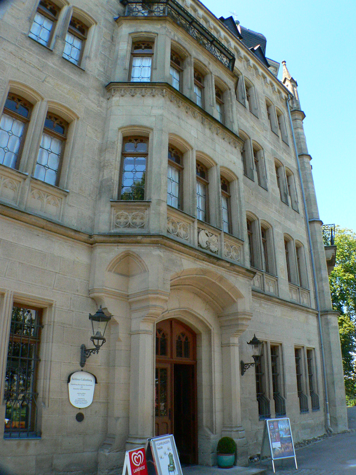 Schloss Callenberg bei Coburg (Germany, Bavaria): Unterschloss mit Ausstellungseingang